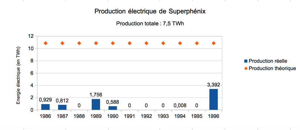 Production électrique du réacteur à neutrons rapides Français Superphénix. Production d'électricité théorique avec un facteur de charge de 100% : 10,86 TWh par an Facteur de charge moyen 1985-1996 : 6,3% Production d'électricité totale 1985-1996 : 7,485TWh Source : AIEA - Base de donnée PRIS (Power Information System)